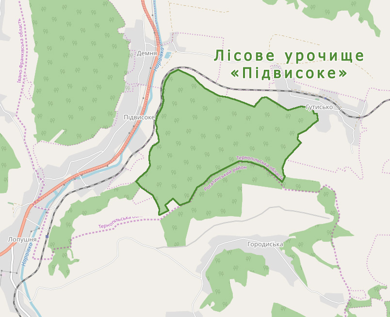 Лісове урочище ««Підвисоке» в Бережанському лісництві Тернопільського обласного управління лісового та мисливського господарства між селами Демня, Підвисоке, Гутисько Тернопільської та Городиська Івано-Франківської областей.